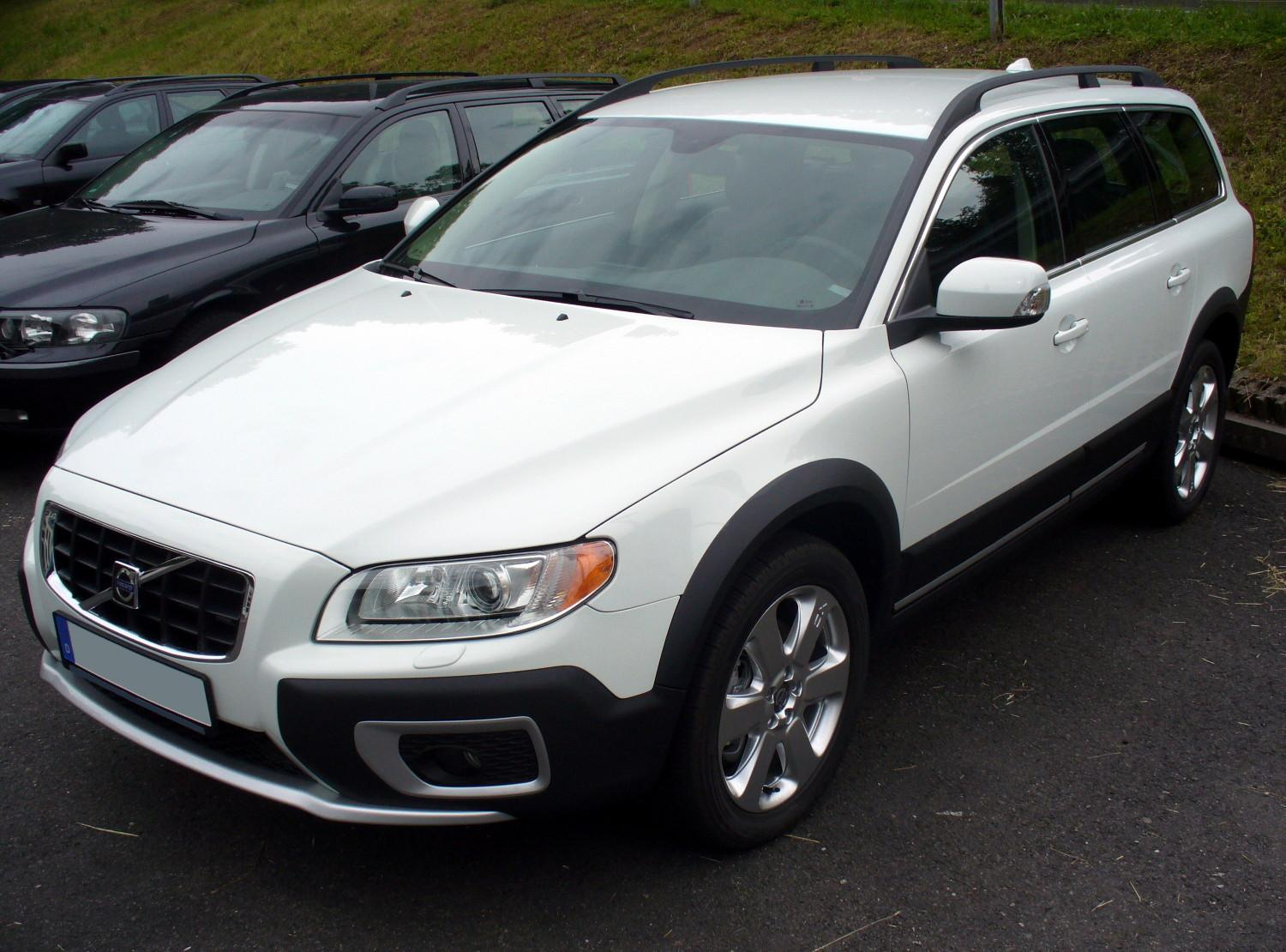 Volvo XC70